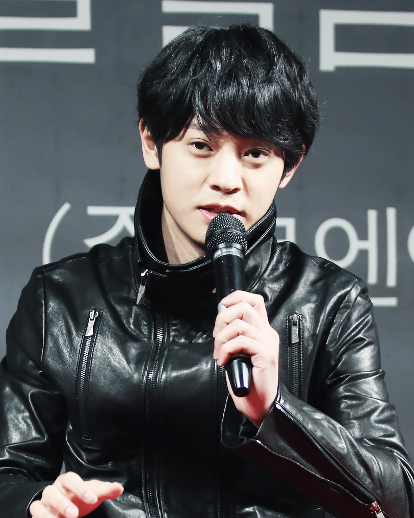 160312 공감 발매기념 인천 팬사인회에서의 정준영.